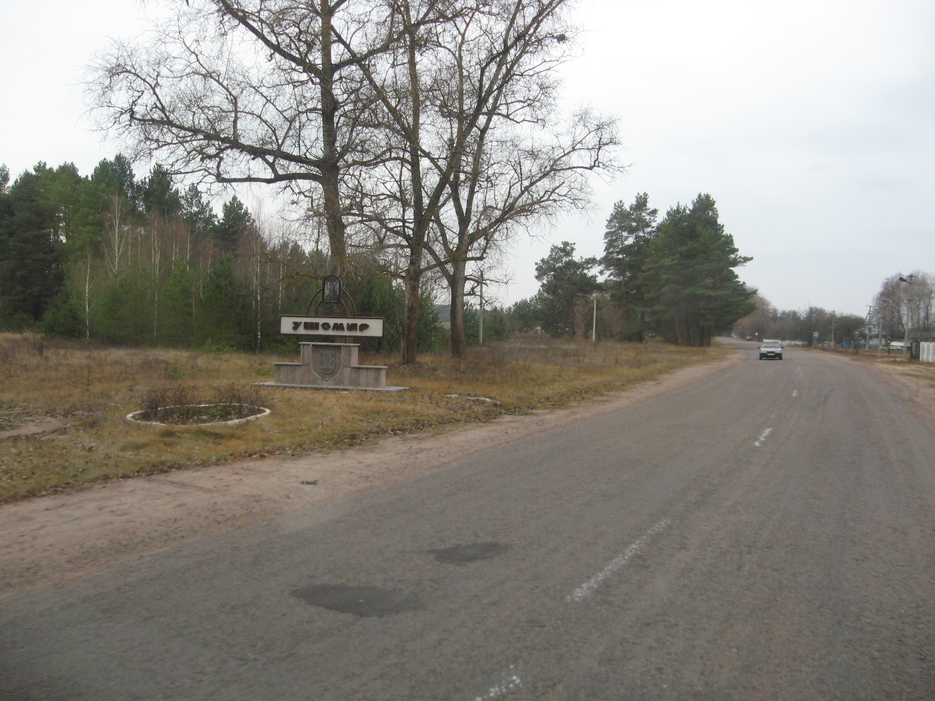 с. Ушомир